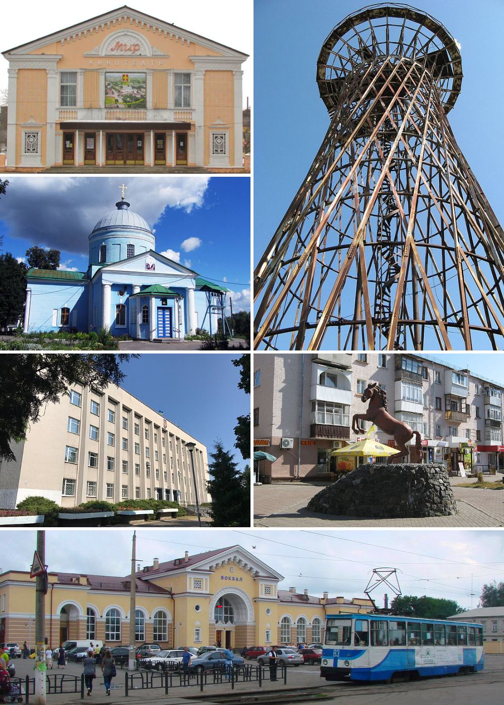 Коллаж для страницы о Конотопе из фотографий